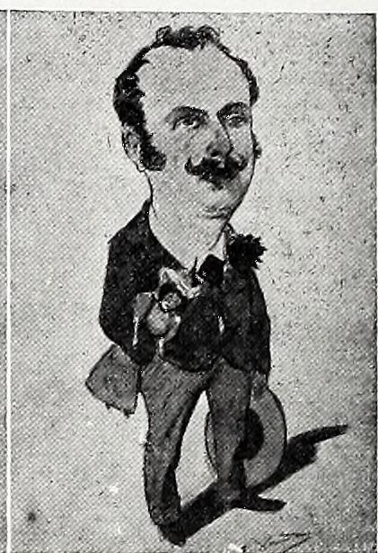 Plantilla de Blanco y Negro.